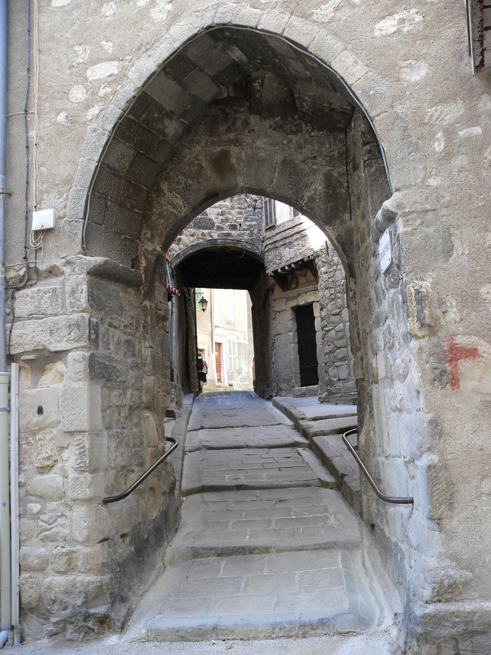 Torbögen in Annot (Frankreich)